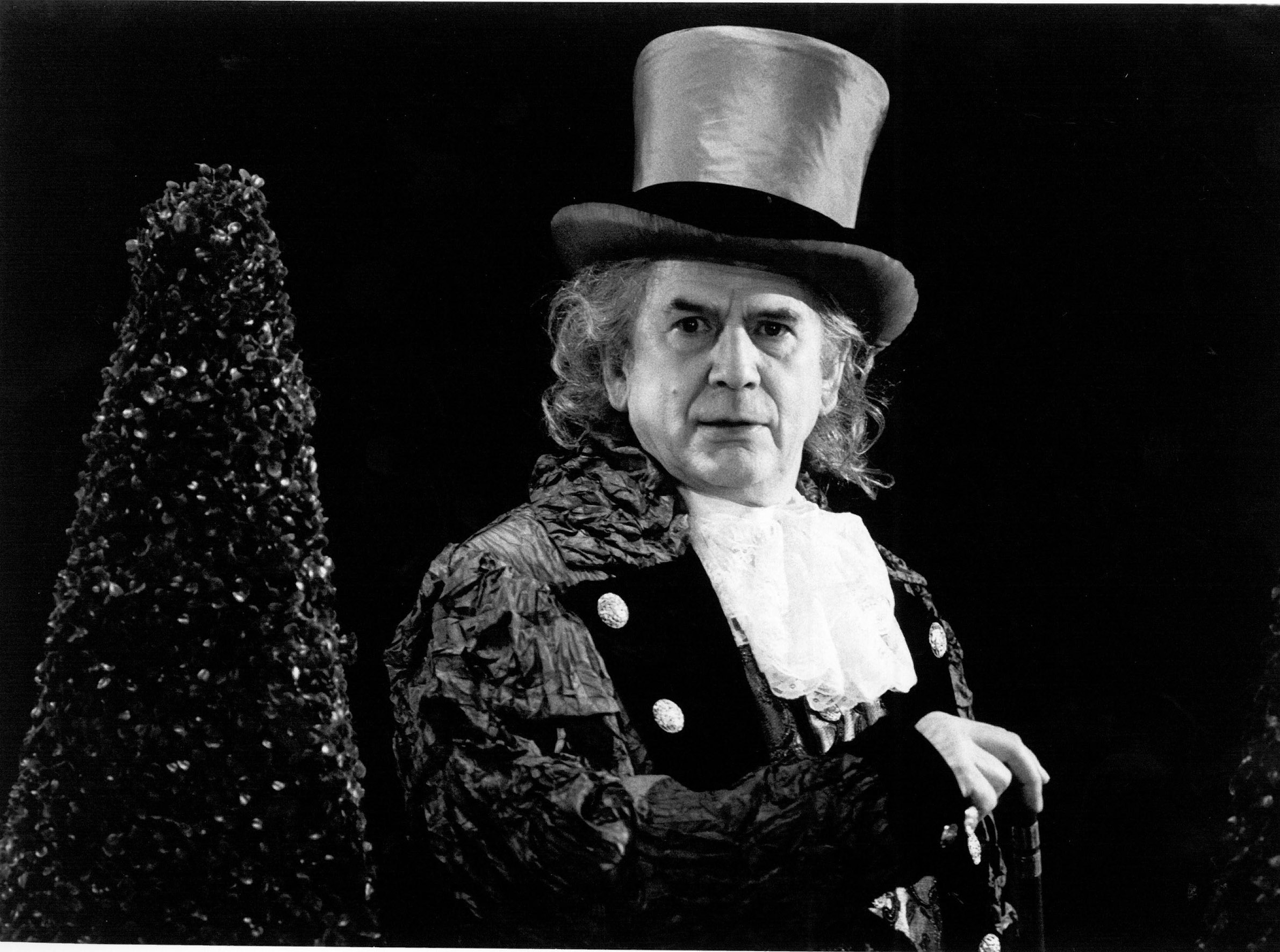 Peter-Christoph Runge (Bariton) as Don Alfonso in Mozart´s "Cosi fan tutte"